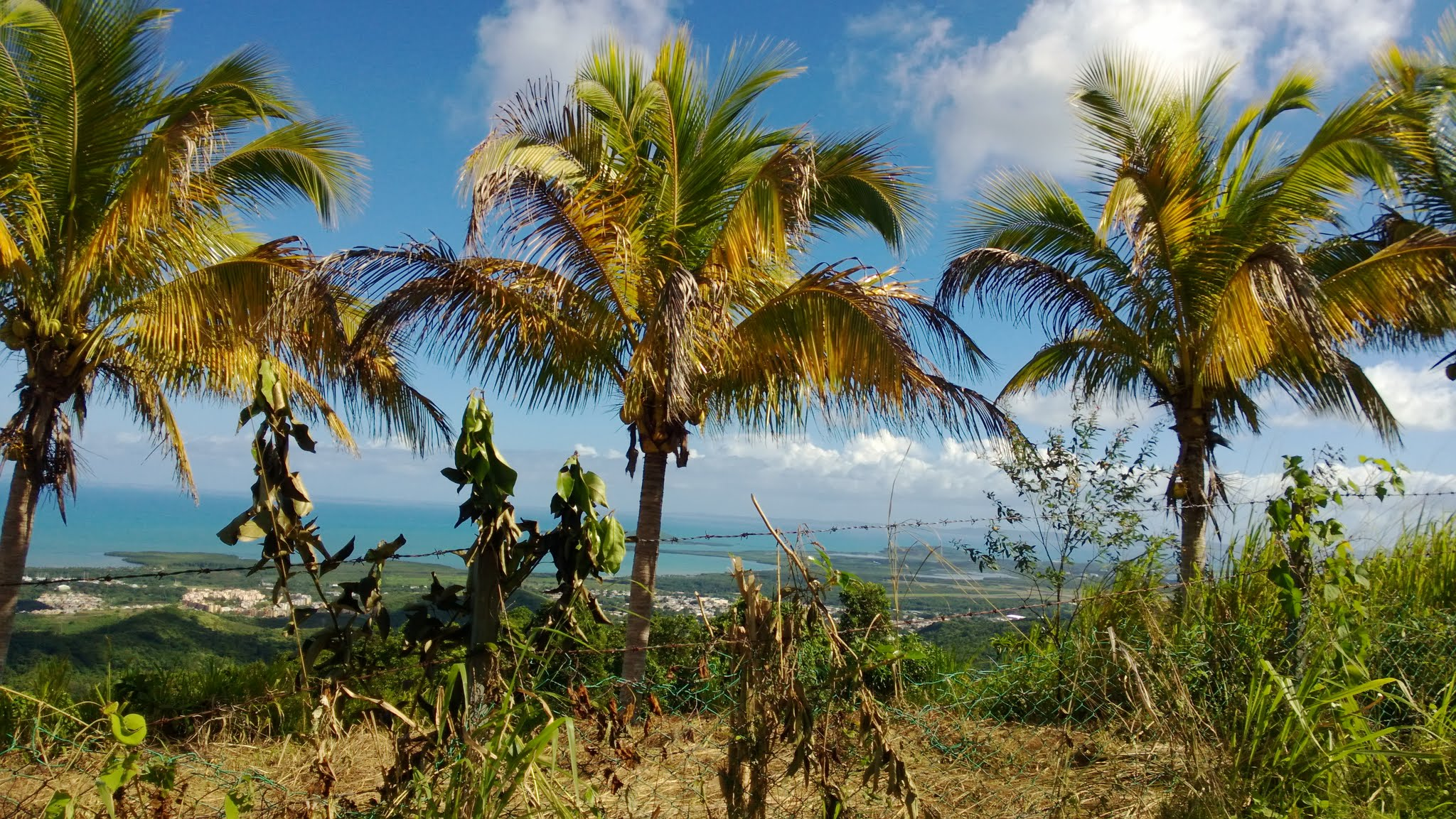 Machos, Ceiba, Puerto Rico